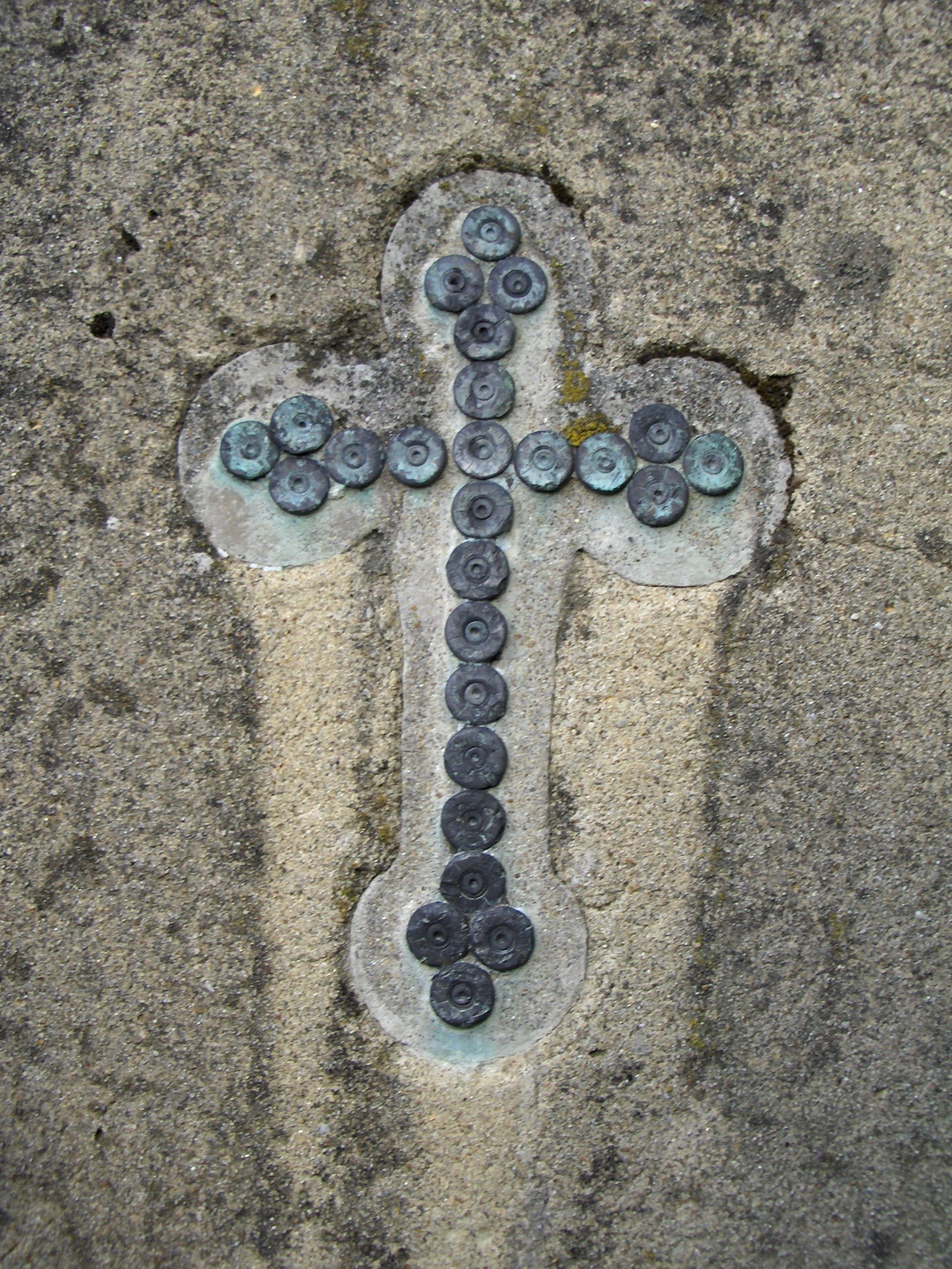 Krzyż utworzony z łusek